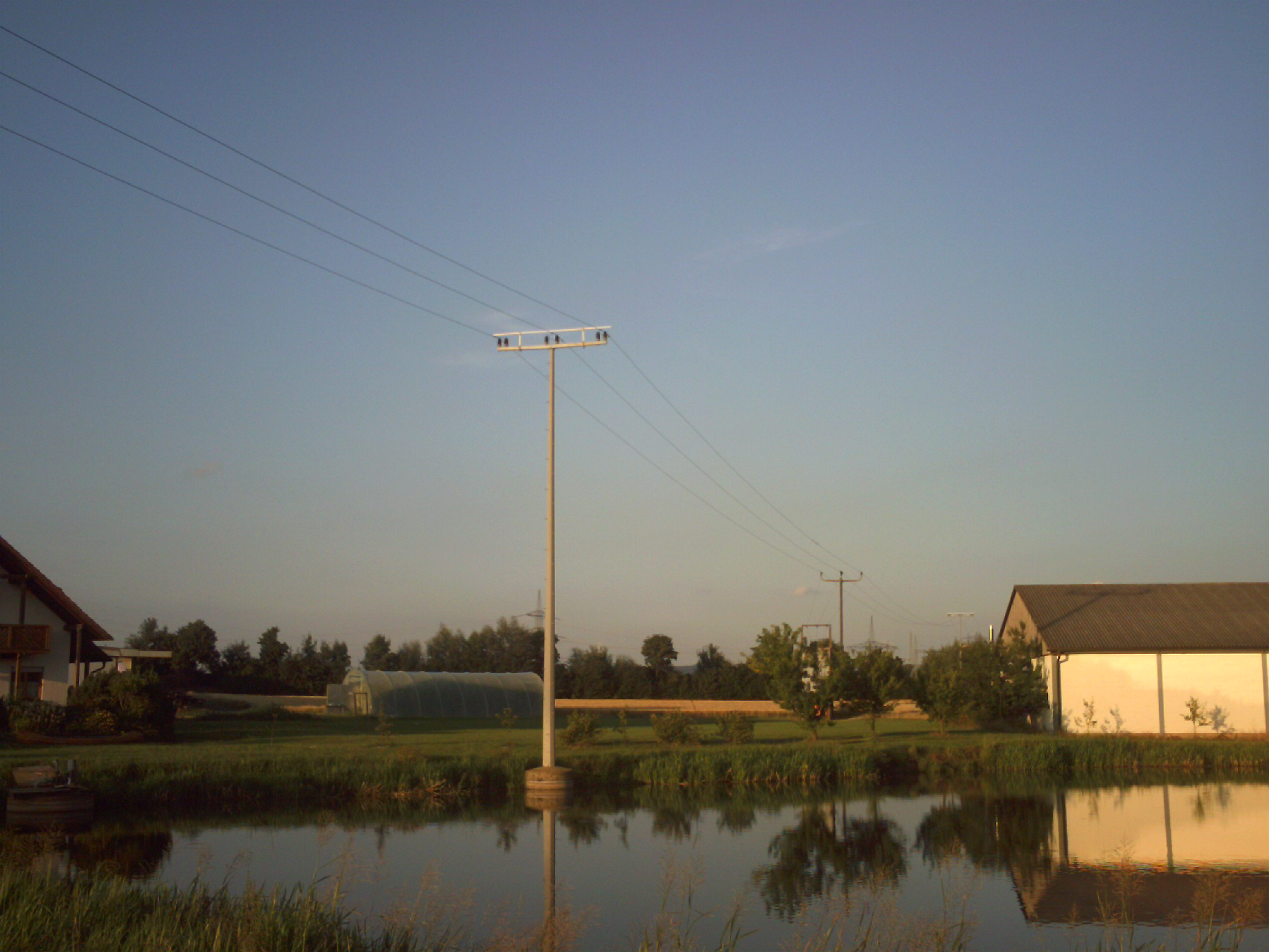 Mast einer Mittelspannungsleitung in einem kleinen See an der Rothenstädter Straße östlich von Etzenricht (westlich vom Umspannwerk Etzenricht)